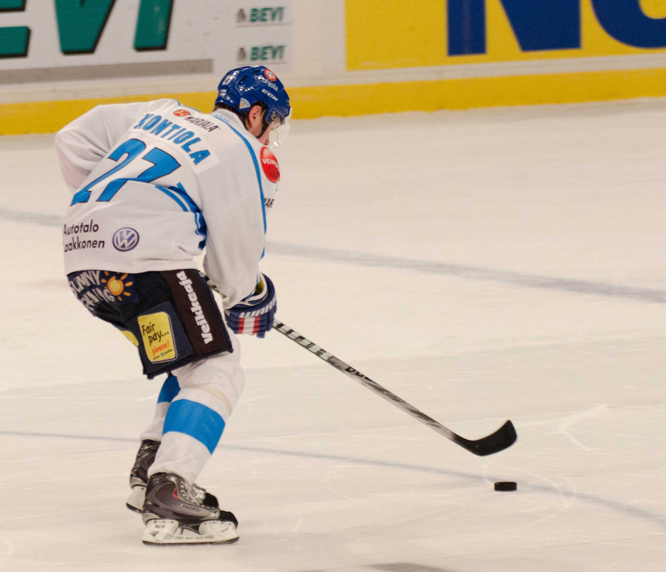 Petri Kontiola Ruotsin EHT-turnauksessa 2011.